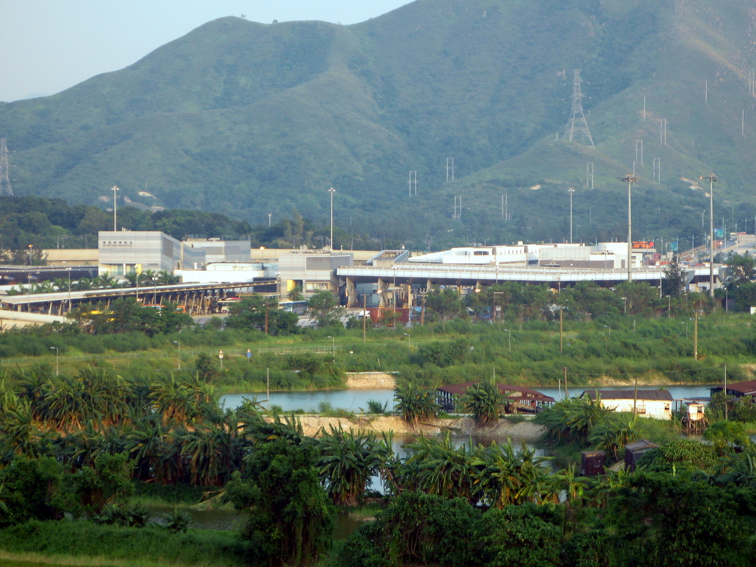 Lok Ma Chau Control Point 落馬洲管制站